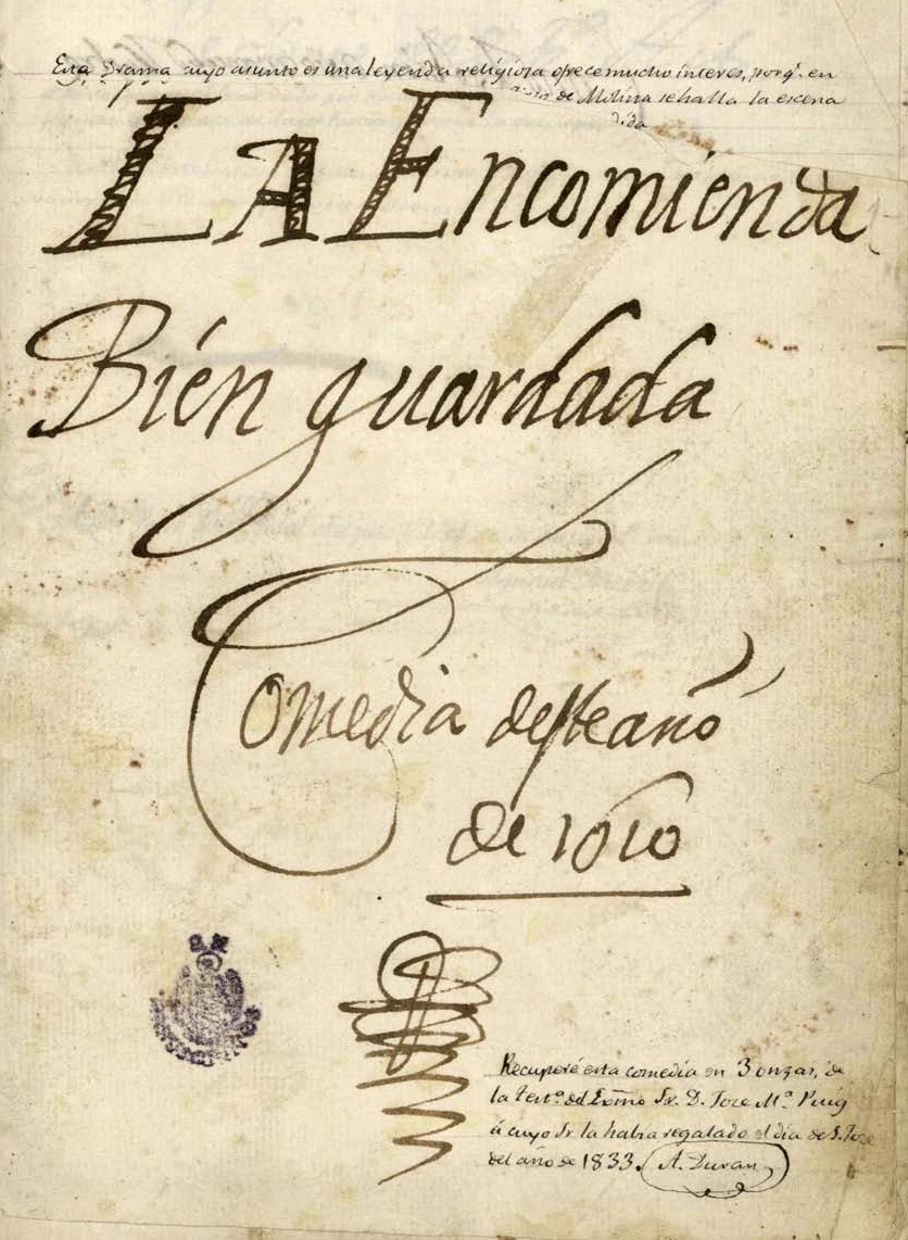 Manuscrito autógrafo de La encomienda bien guardada, también titulada en páginas interiores La buena guarda, de Lope de Vega. Firmado en Madrid a 16 de abril de 1610. Ms. Vitr. 7-16. Madrid, Biblioteca Nacional (España)